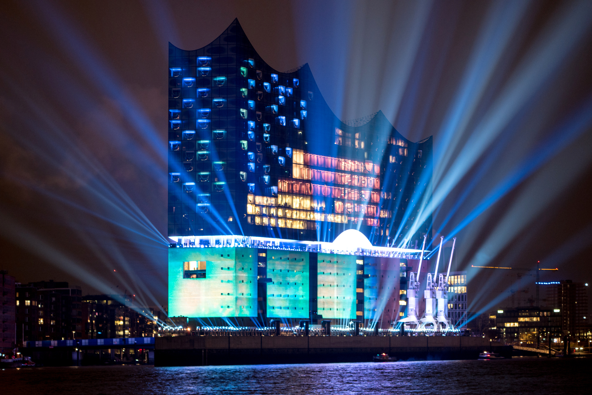 Elbphilharmonie Illumination zur Eröffnung